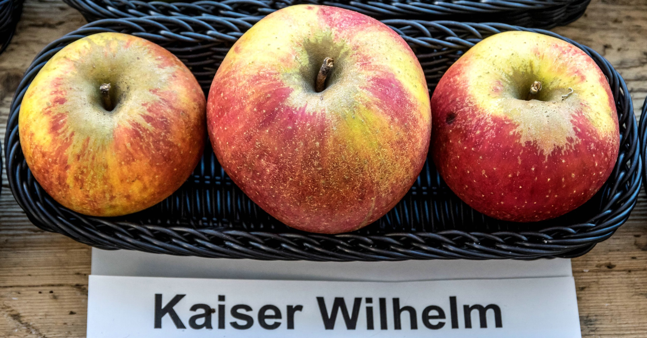 Alte Apfelsorten, von denen es im Badischen noch tragende Bäume gibt. Alle Aufnahmen au dem Oktober 2015